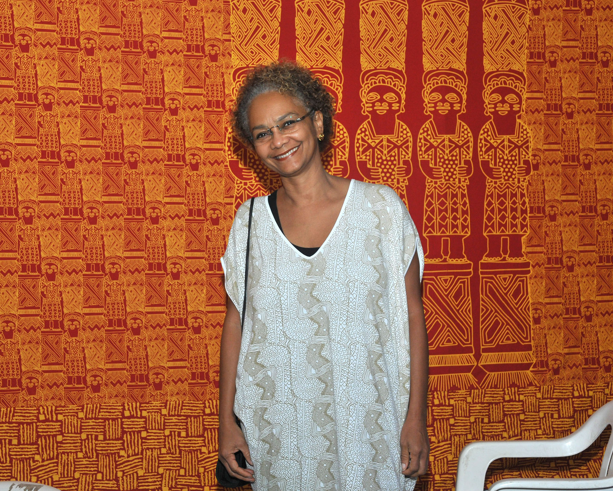 Comemoracao dos "100 ANOS DO CANDOMBLÉ DE SÃO GONÇALO: E DAÍ, NASCEU O ENCANTO! ILÊ AXÉ OPO AFONJA" na foto: Designer baiana Goya Lopes. Data: 30/07/2010 Foto: Roberto Abreu